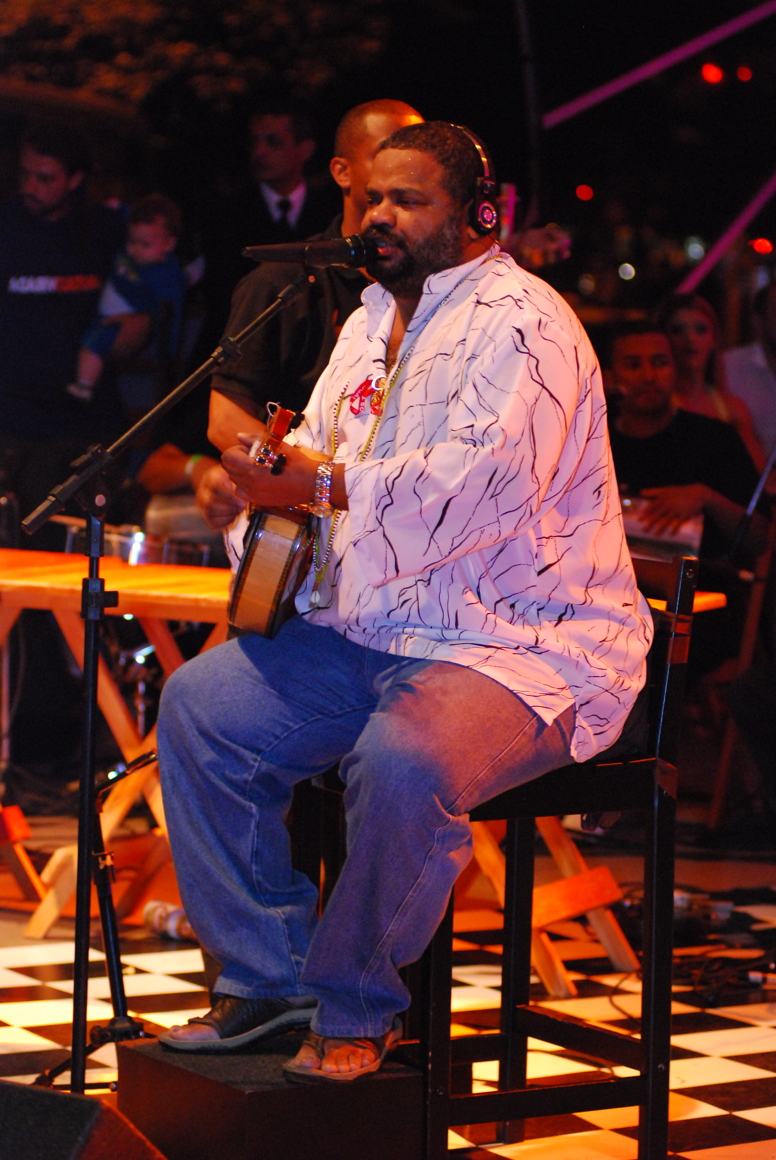 Foto: Silvio Tanaka